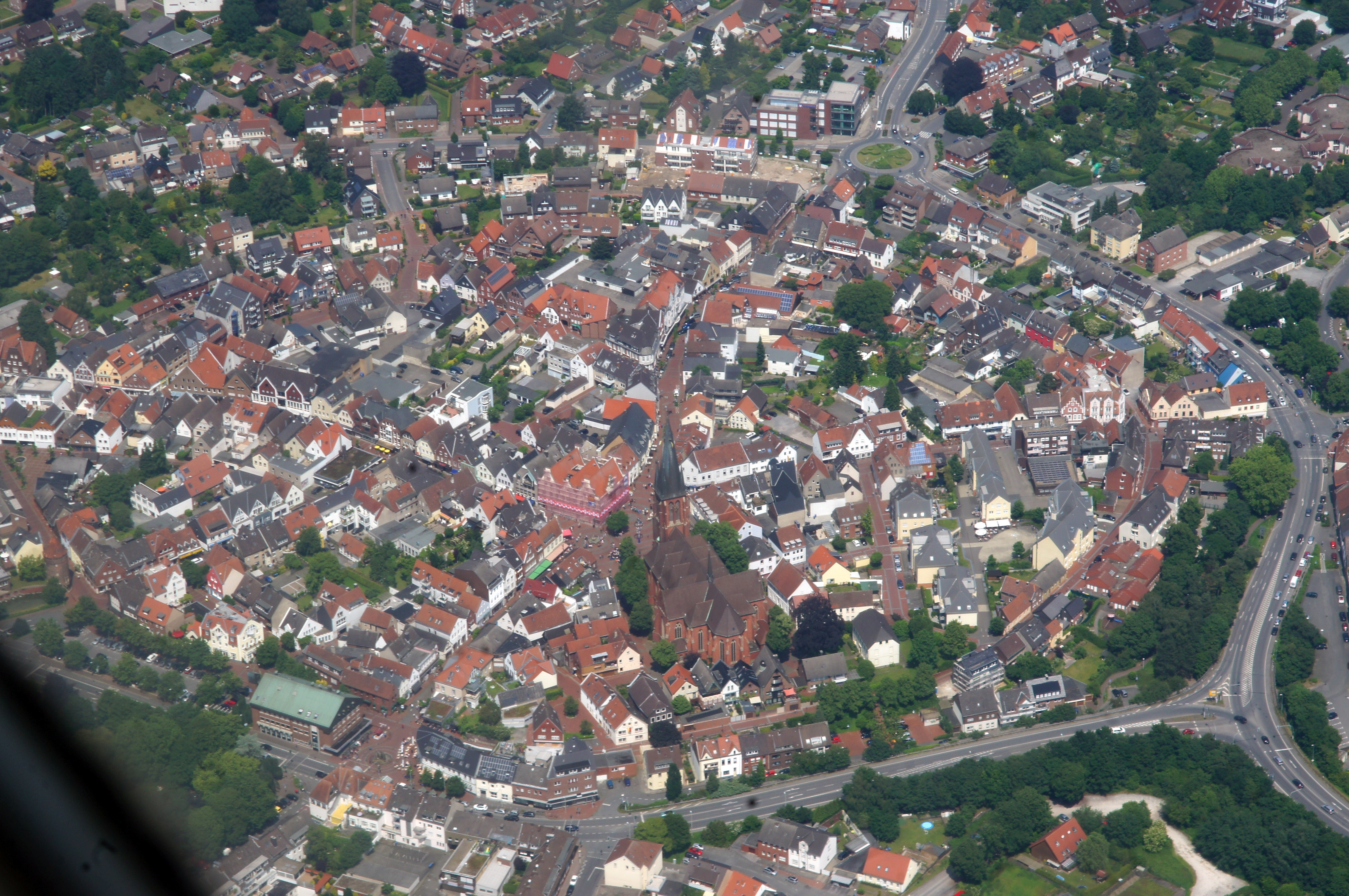 Stadtzentrum Haltern am See, Kreis Recklinghausen, NRW. Das Bild entstand während des Münsterland-Fotoflugs am 1. Juni 2014. Hinweis: Die Aufnahme wurde aus dem Flugzeug durch eine Glasscheibe hindurch fotografiert.